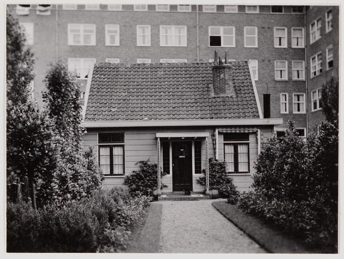 Beschrijving Kwekerij-bloemisterij J.H. Hoffman hzn Jan Evertsenstraat 18-18A, gezien naar de achterzijde van de huizen aan de Cornelis Dirkszstraat. Documenttype foto Vervaardiger Onbekend Anoniem Collectie Collectie Stadsarchief Amsterdam: foto-afdrukken Datering 5 juli 1937 ca. Geografische naam Jan Evertsenstraat Cornelis Dirkszstraat Inventarissen Afbeeldingsbestand OSIM00004002049